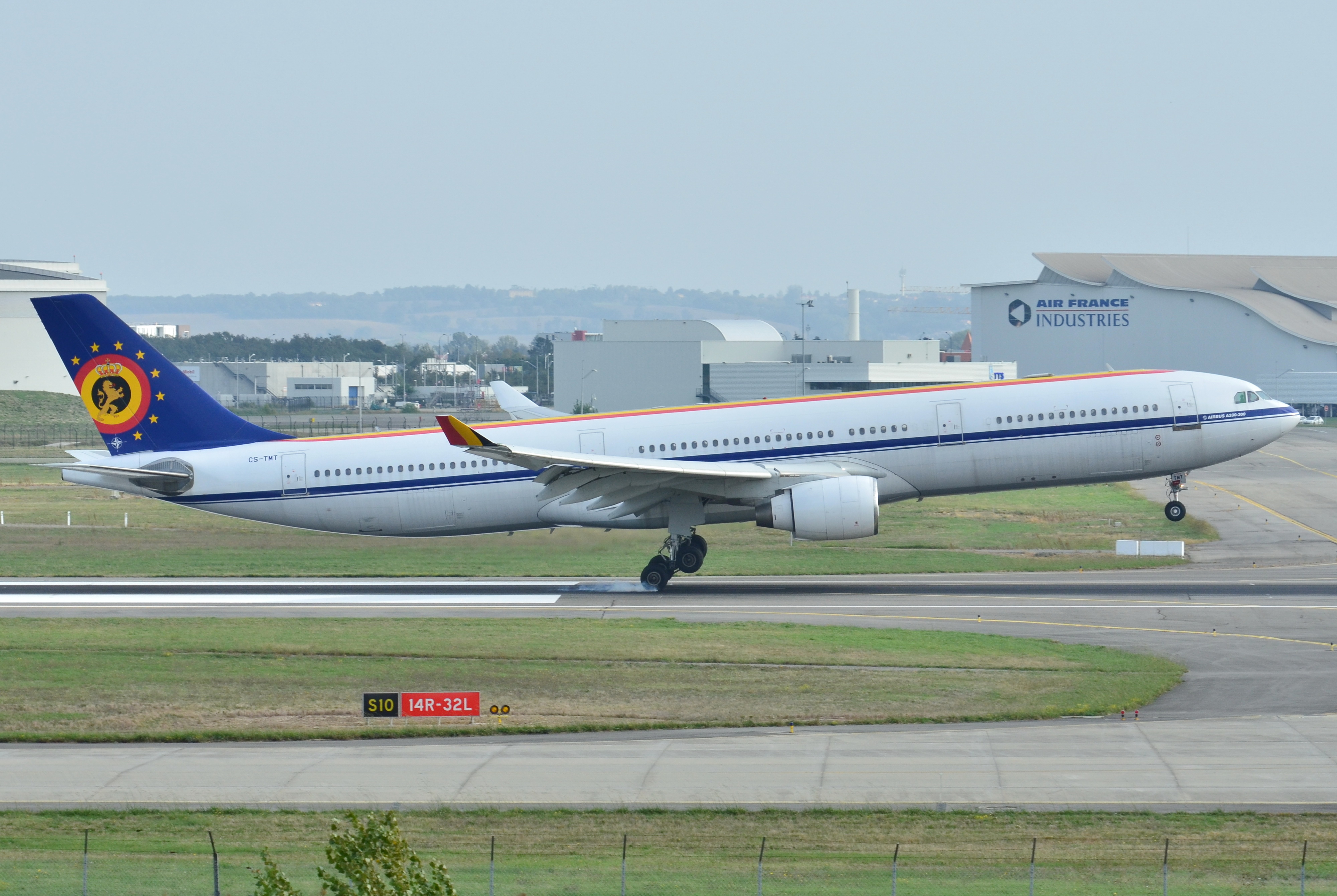 Photo prise à l'aéroport de Toulouse-Blagnac (LFBO) en France. Picture take at Toulouse-Blagnac Airport (LFBO) in France.